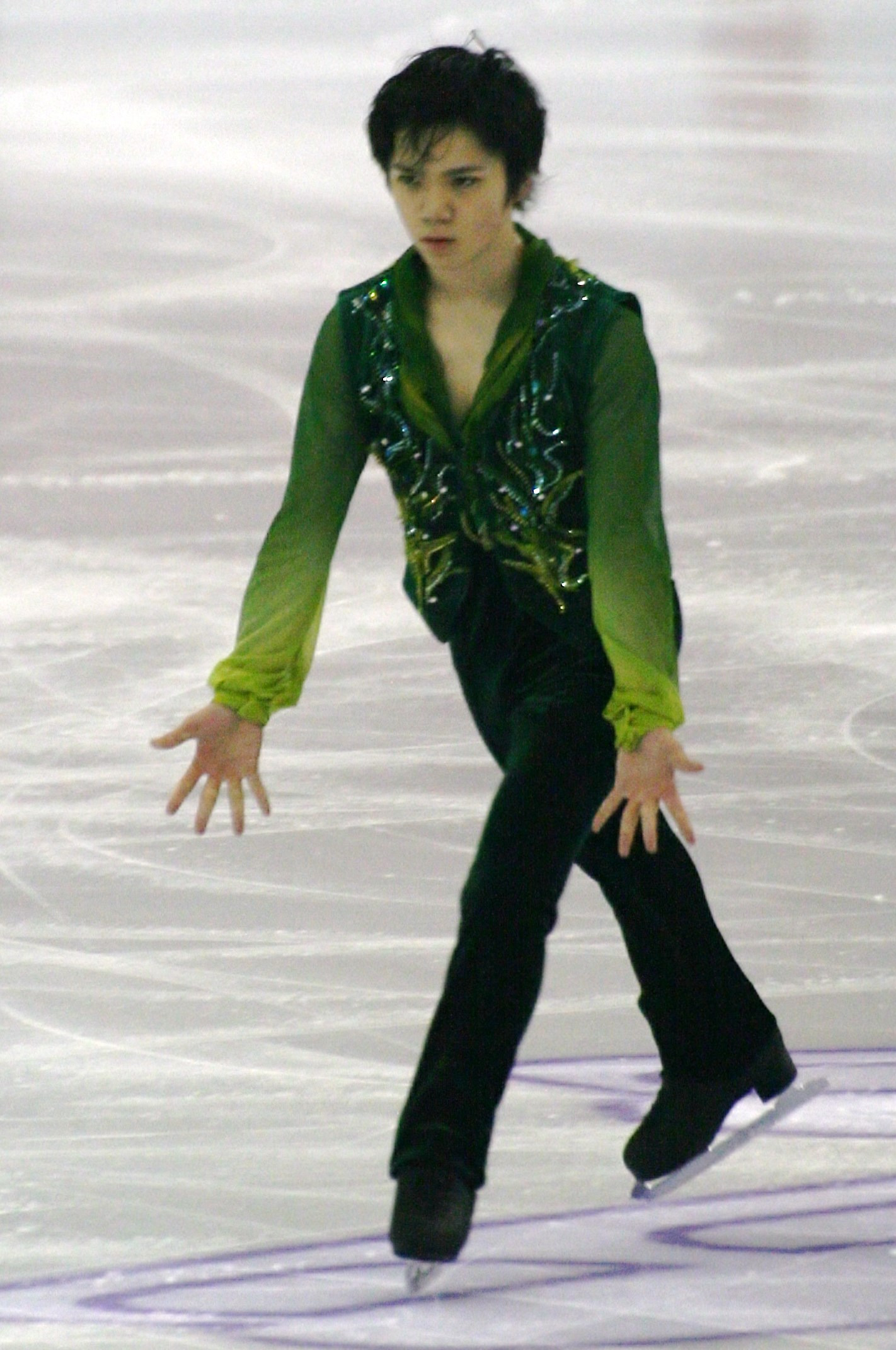 Шома Уно (Япония) на финале Гран-при по фигурному катанию 2015-2016.